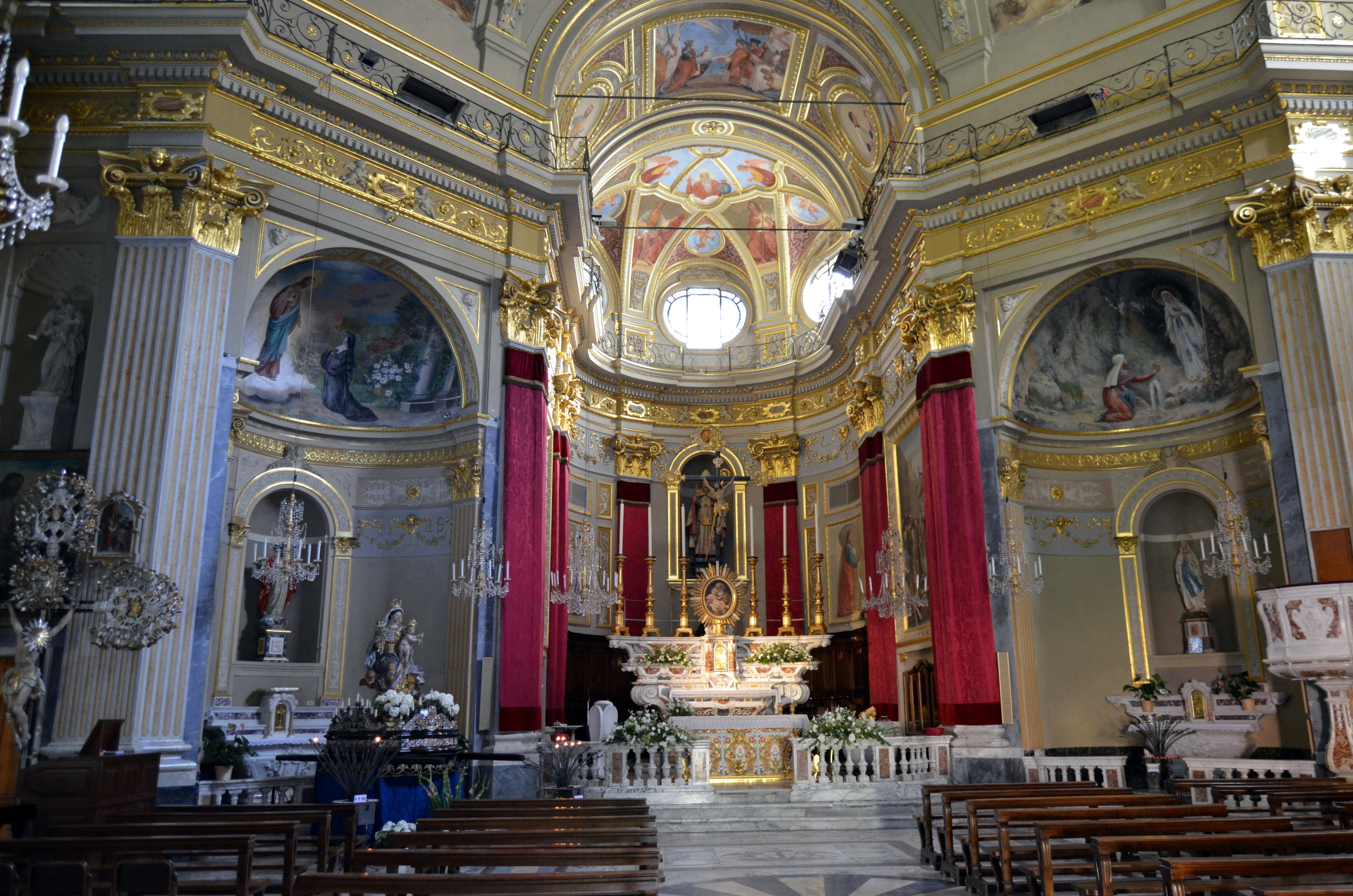 Navata centrale della Chiesa di San Martino, Zoagli, Liguria, Italia